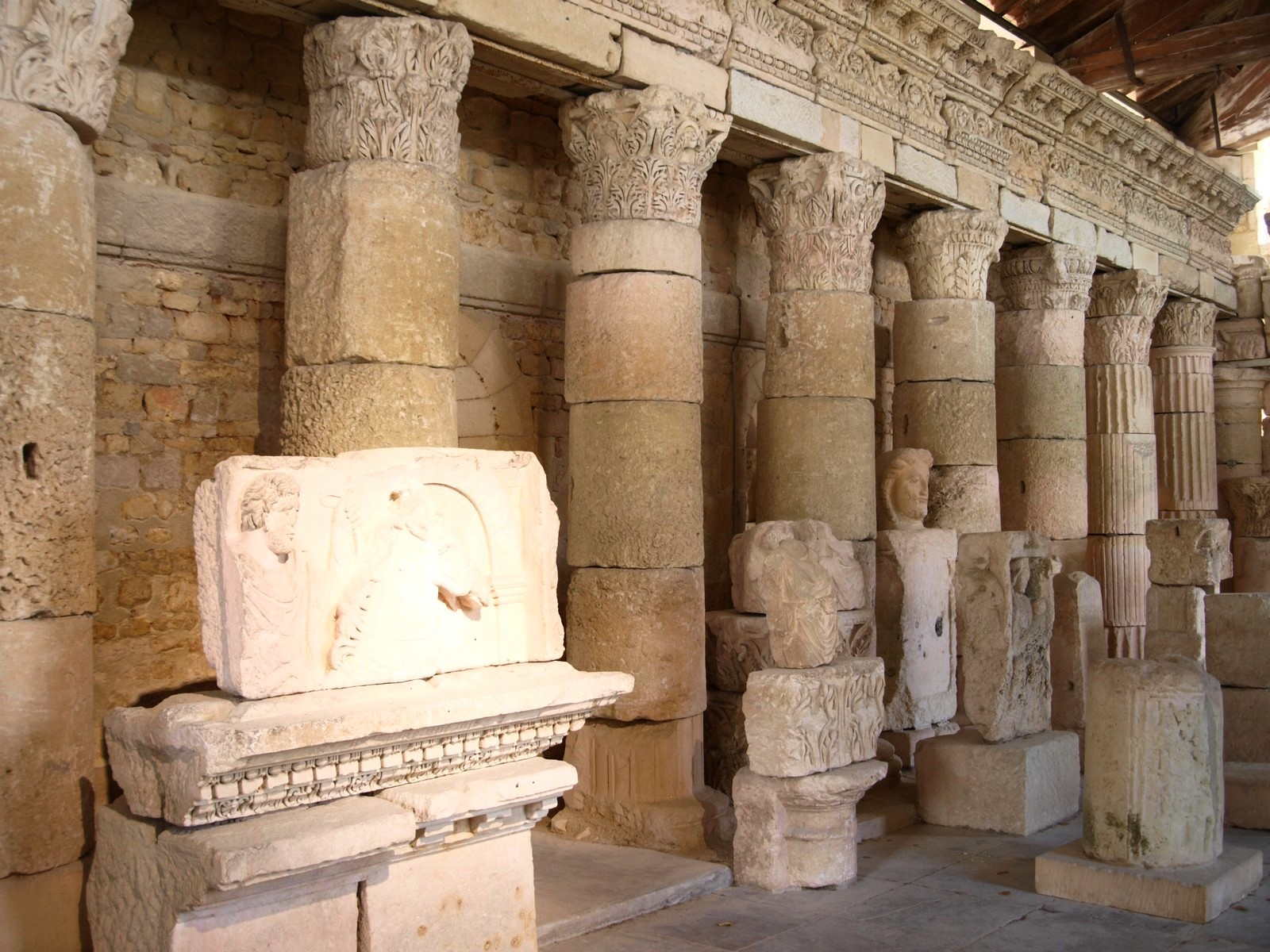 Musée archéologique de Saintes